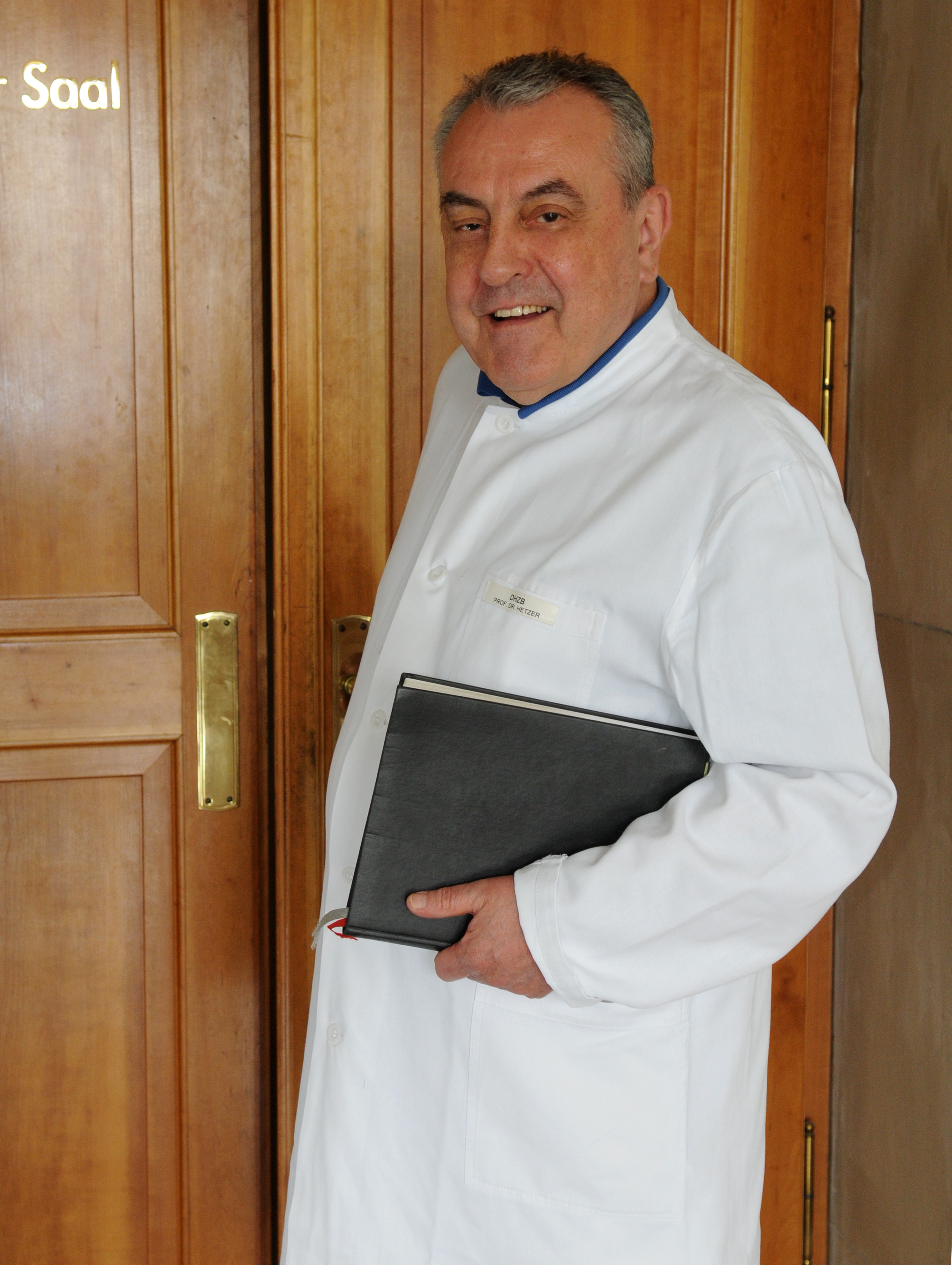 Prof. Dr. Roland Hetzer 2011